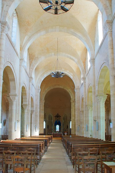 Intérieur de l'église Saint Alban de Lormes (Nièvre)